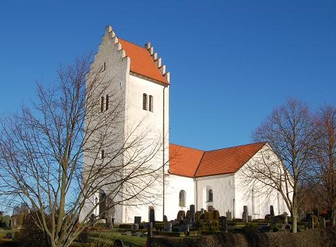 Skurup Kyrka; The Church in Skurup, Sweden.